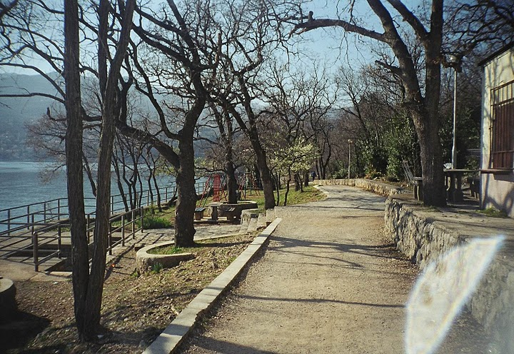 Costabella, Šetalište Milića Jardasa, 51000 Rijeka